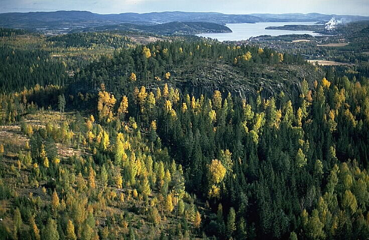 Fornborgen i bildens mitt.